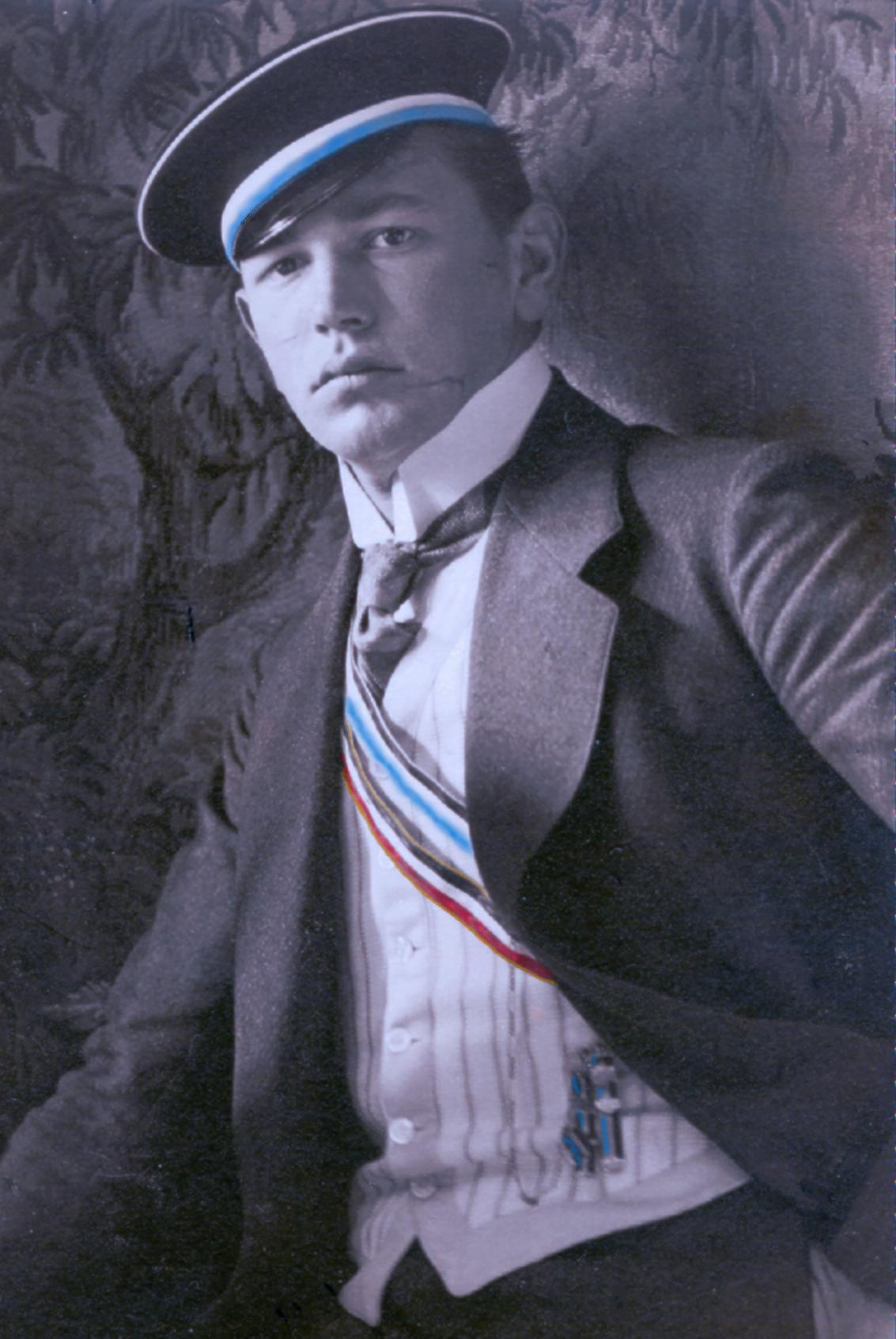 Ernst Wendler als Senior des Corps Suevia München